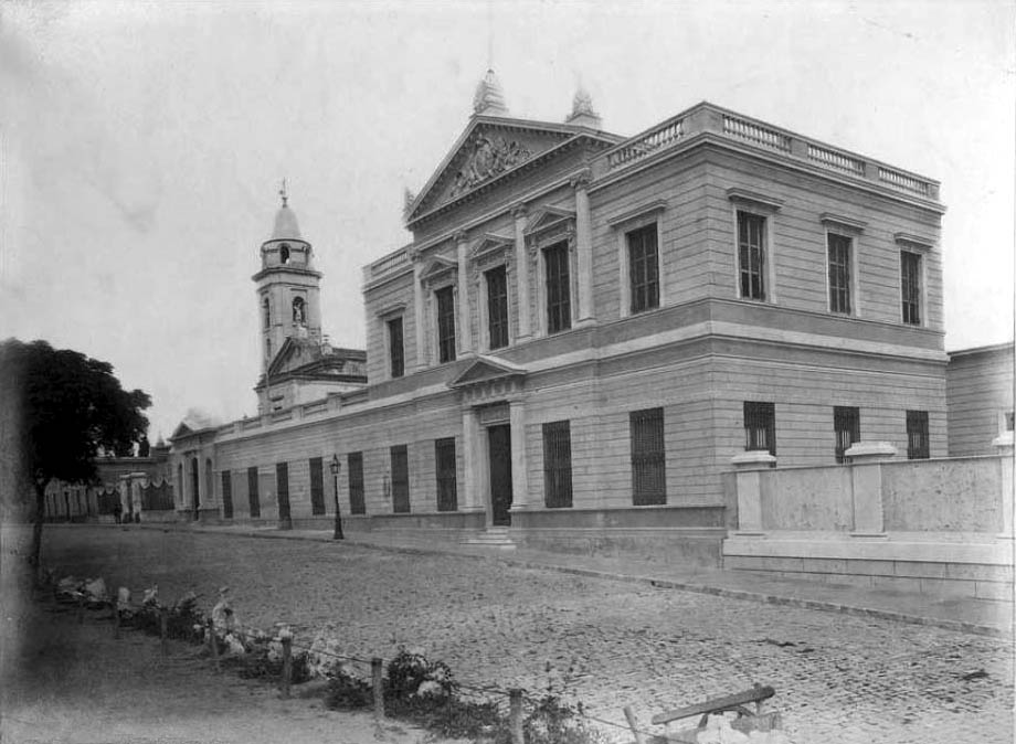 Asilo de Mendigos, ubicado en el barrio de Recoleta. Actualmente se encuentra el Centro Cultural Recoleta.